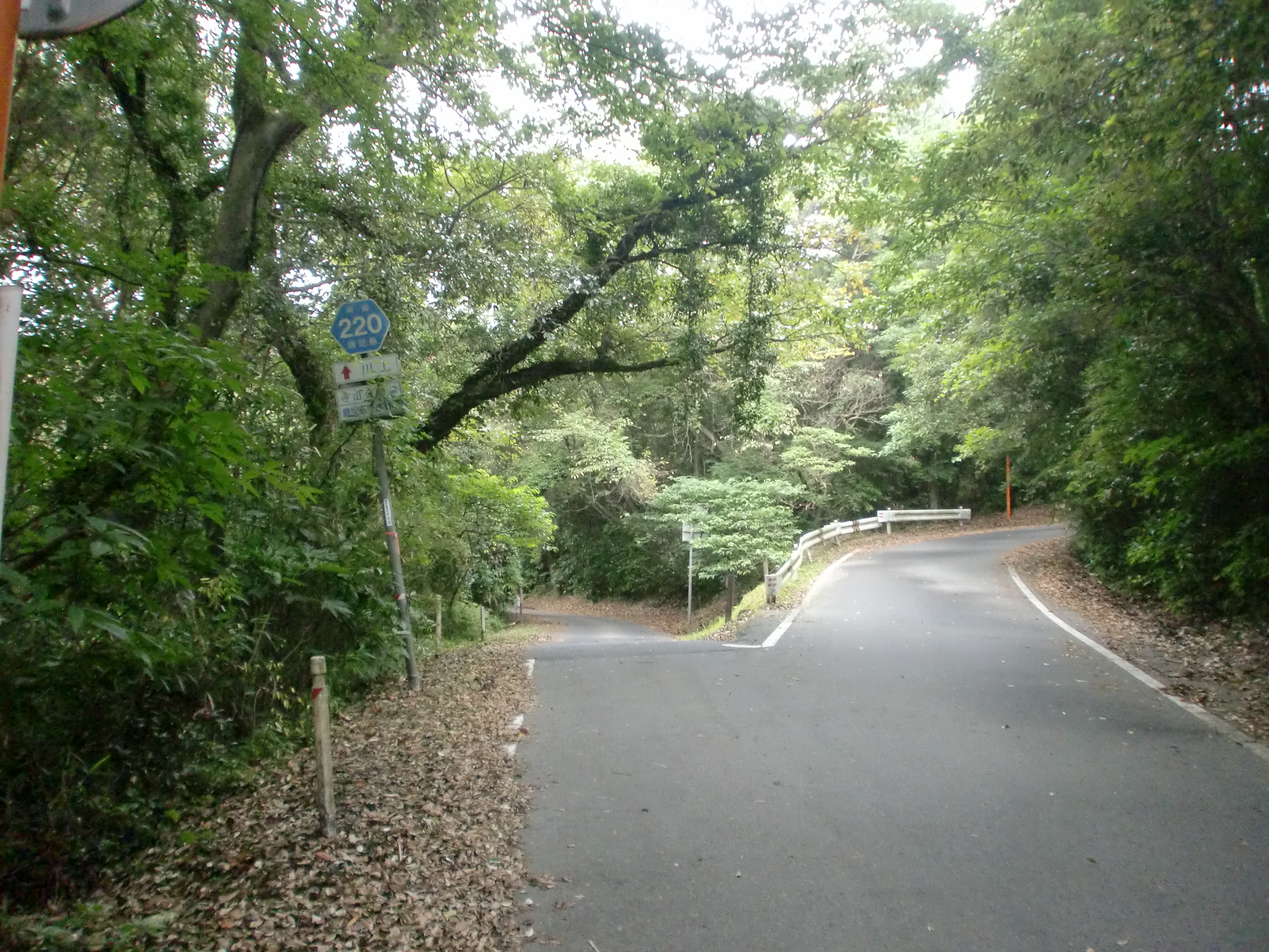 鹿児島県道215号吉野公園線（画像手前から右方向）と鹿児島県道220号寺山公園線の起点（画像左方向）の交差点